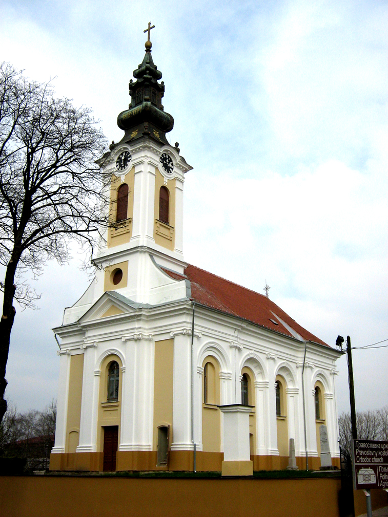 Pravoslavna crkva u Kulpinu nakon rekonstrukcije 2009. godine